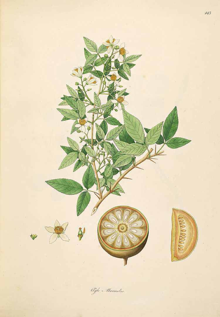 Баель